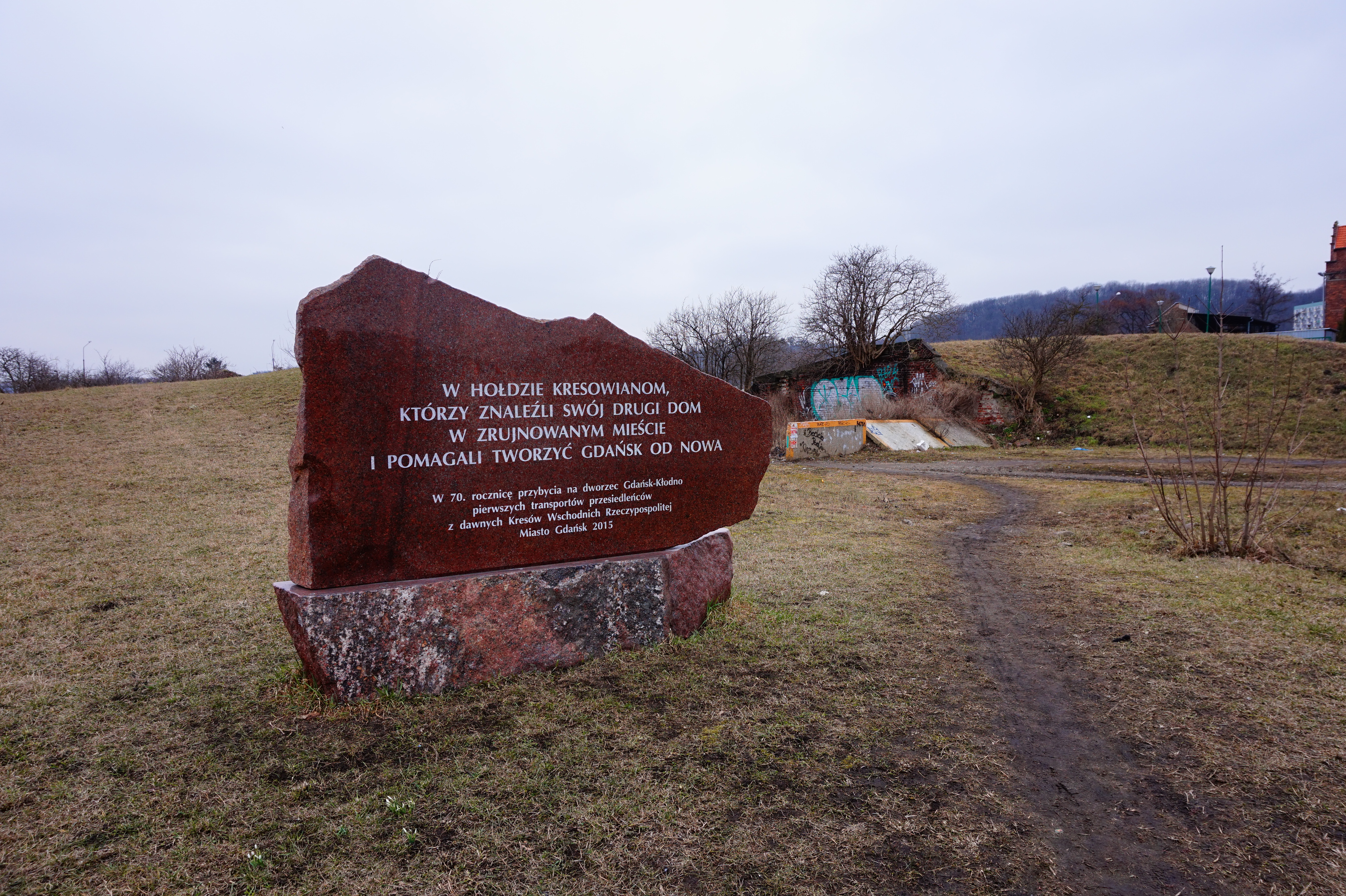 Pozostałości dworca PKP Gdańsk - Kłodno.